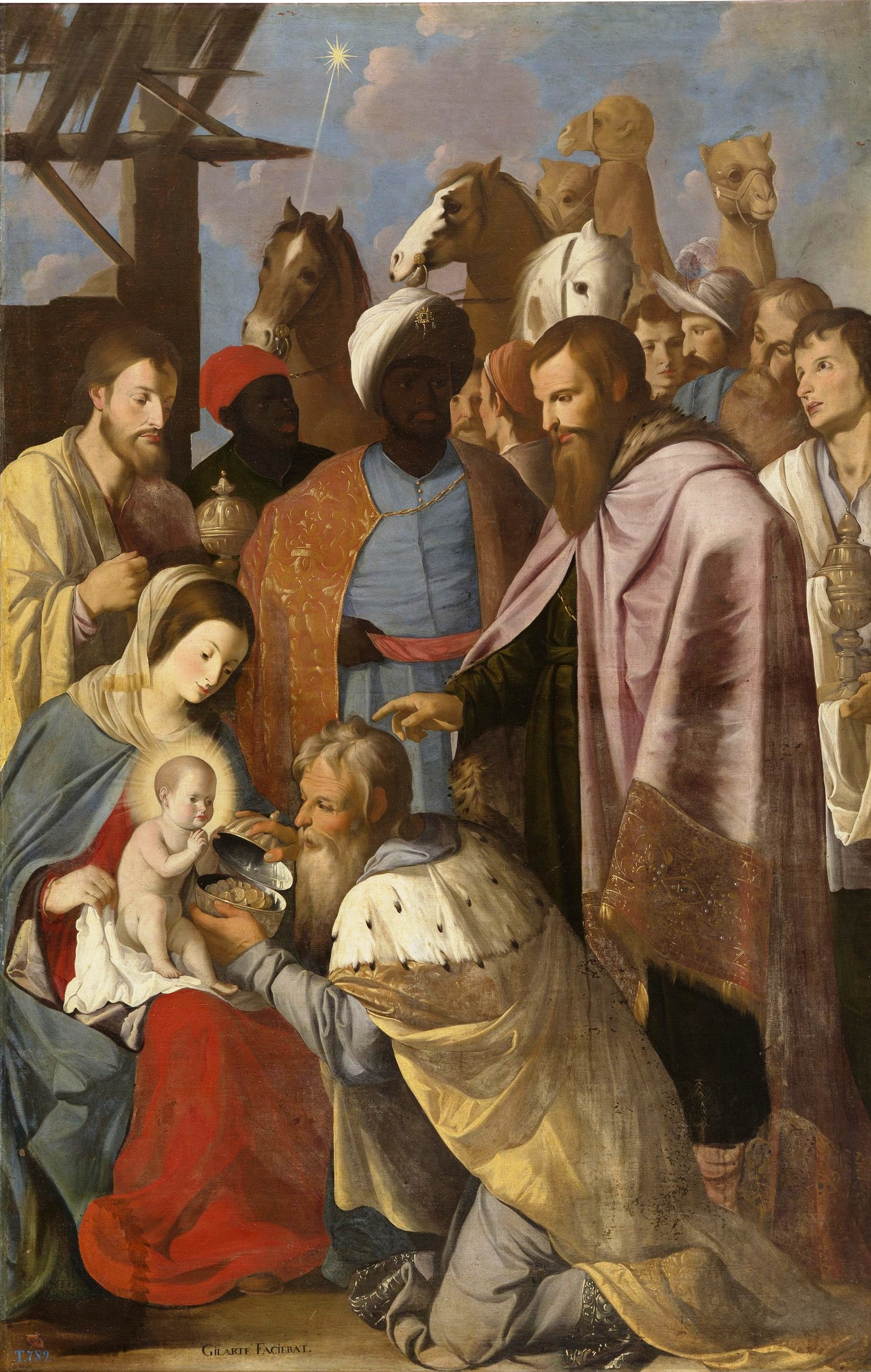 La obra representa el momento en que el Niño Jesús fue adorado por los tres Reyes magos.